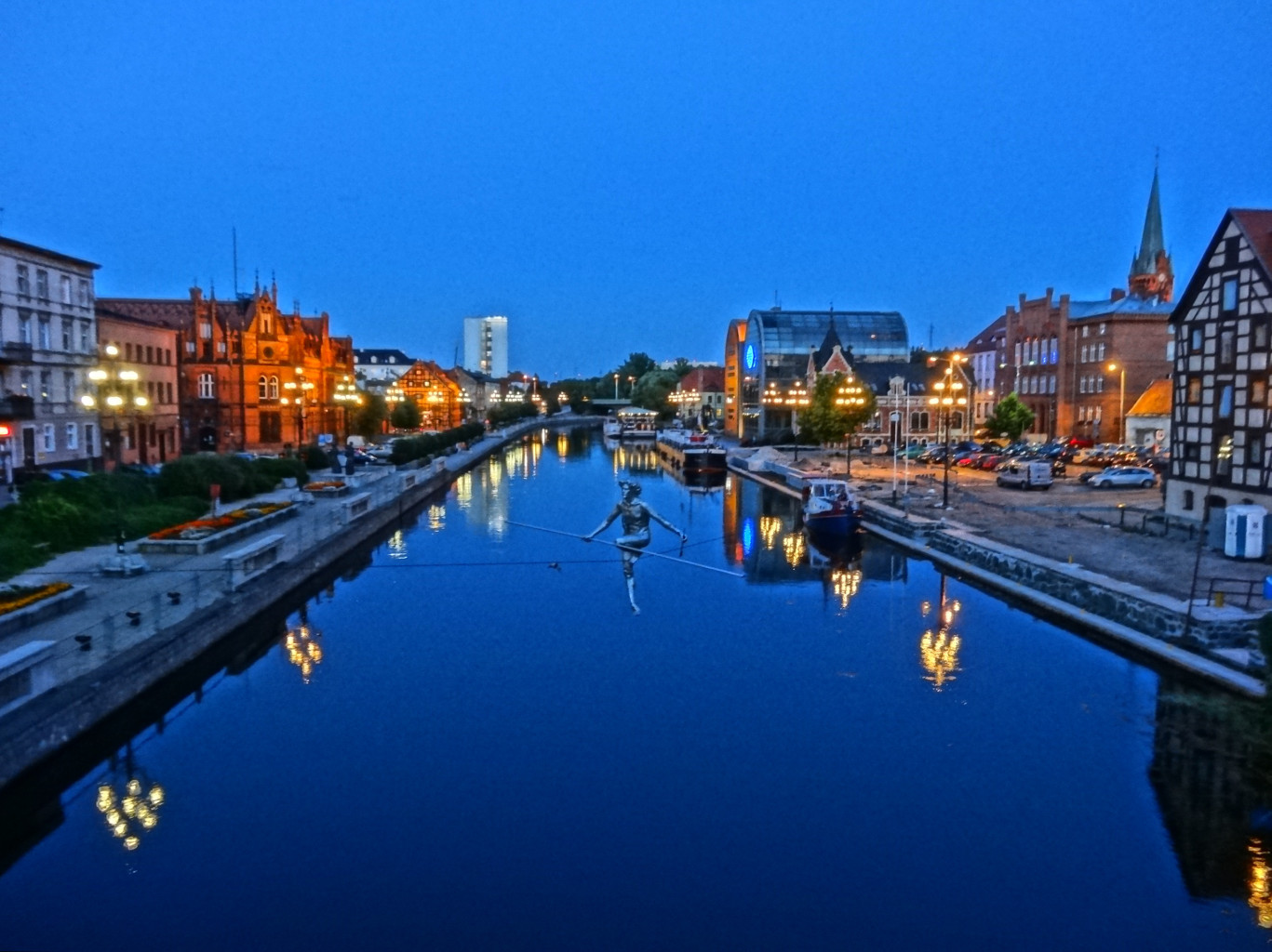 Widok z mostu Staromiejskiego im. Jerzego Sulimy-Kamińskiego w Bydgoszczy